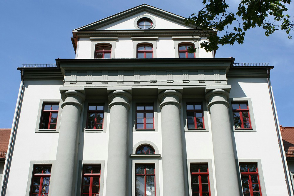 Parkansicht Bernhardsches Herrenhaus in Chemnitz, August 2009.